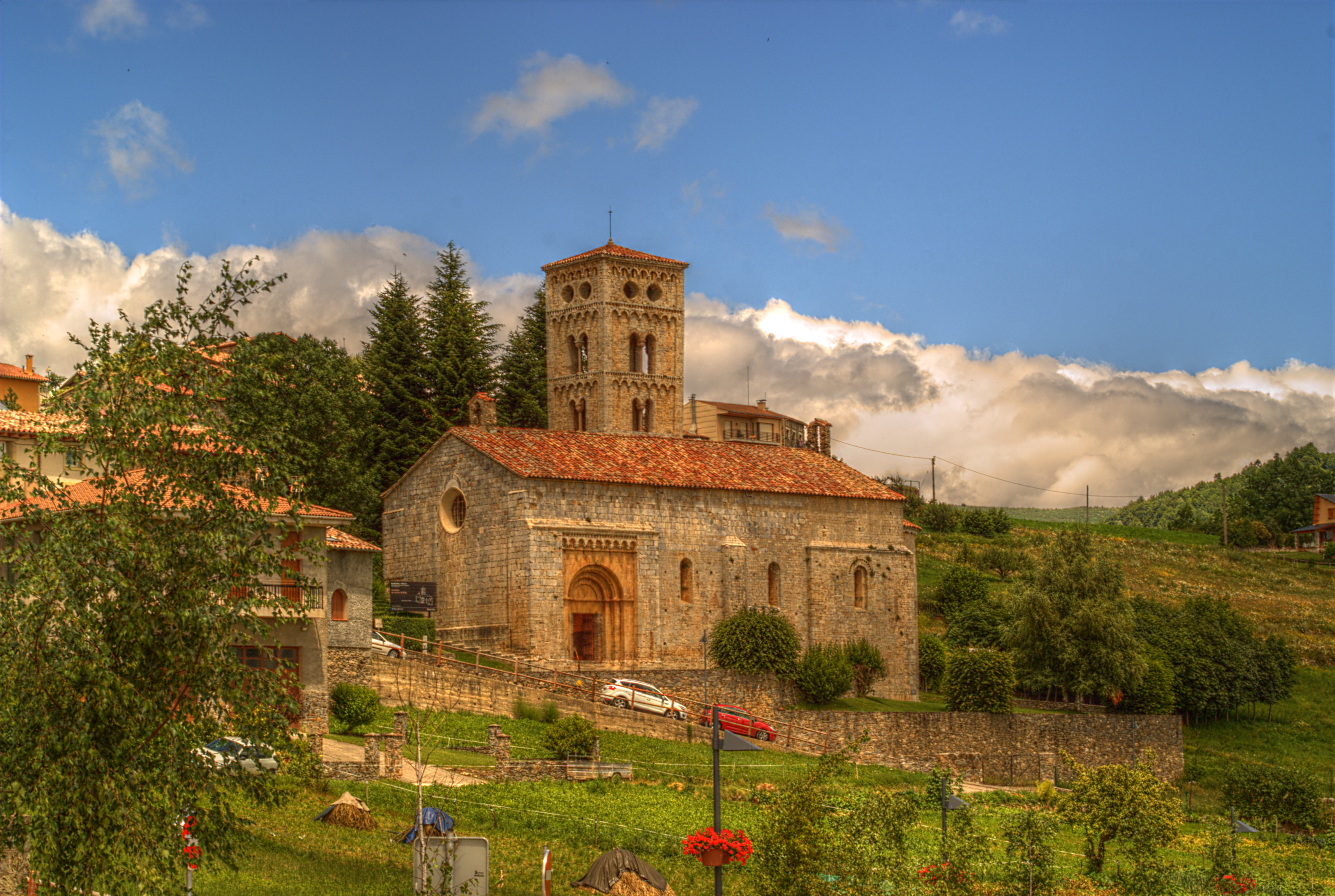 Église Sainte-Cécile, Molló, (Ripollès, Catalogne, Espagne)